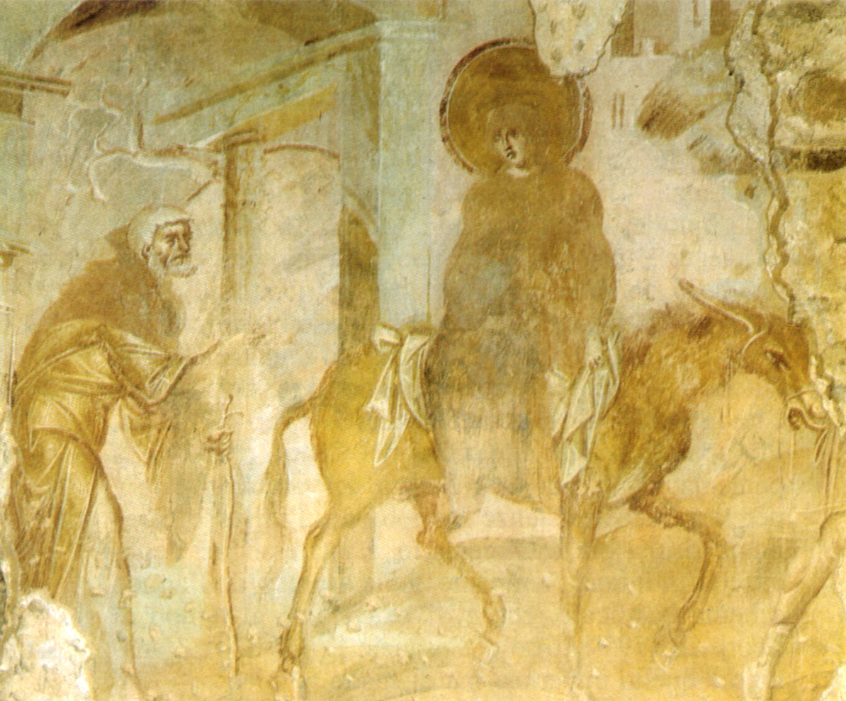 Maestro di castelseprio, andata a betlemme